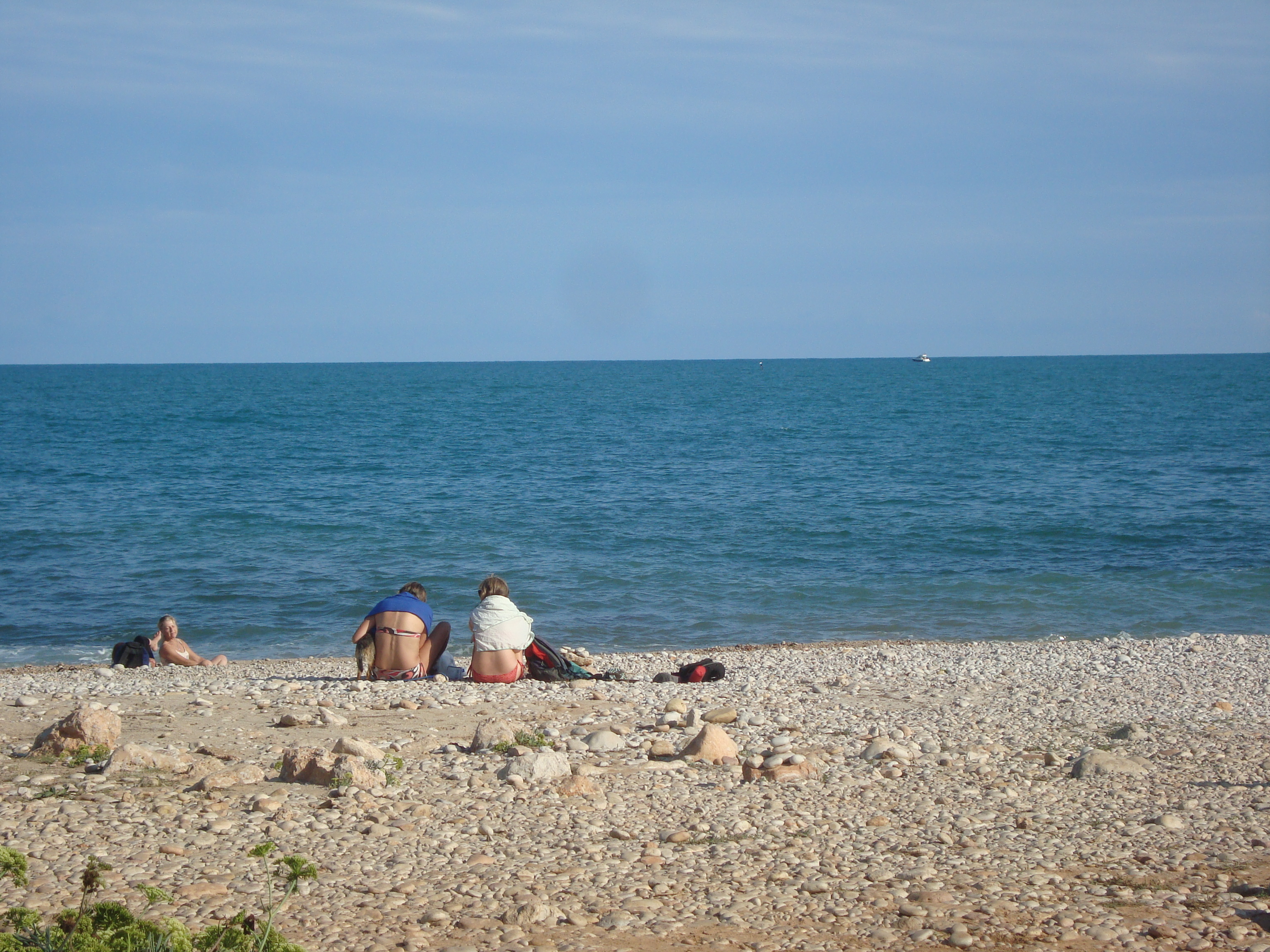 Platja del Serradal de Ribamar (Alcalà de Xivert) This is a a photo of a beach in the Land of Valencia, Spain, with id: PL-1418